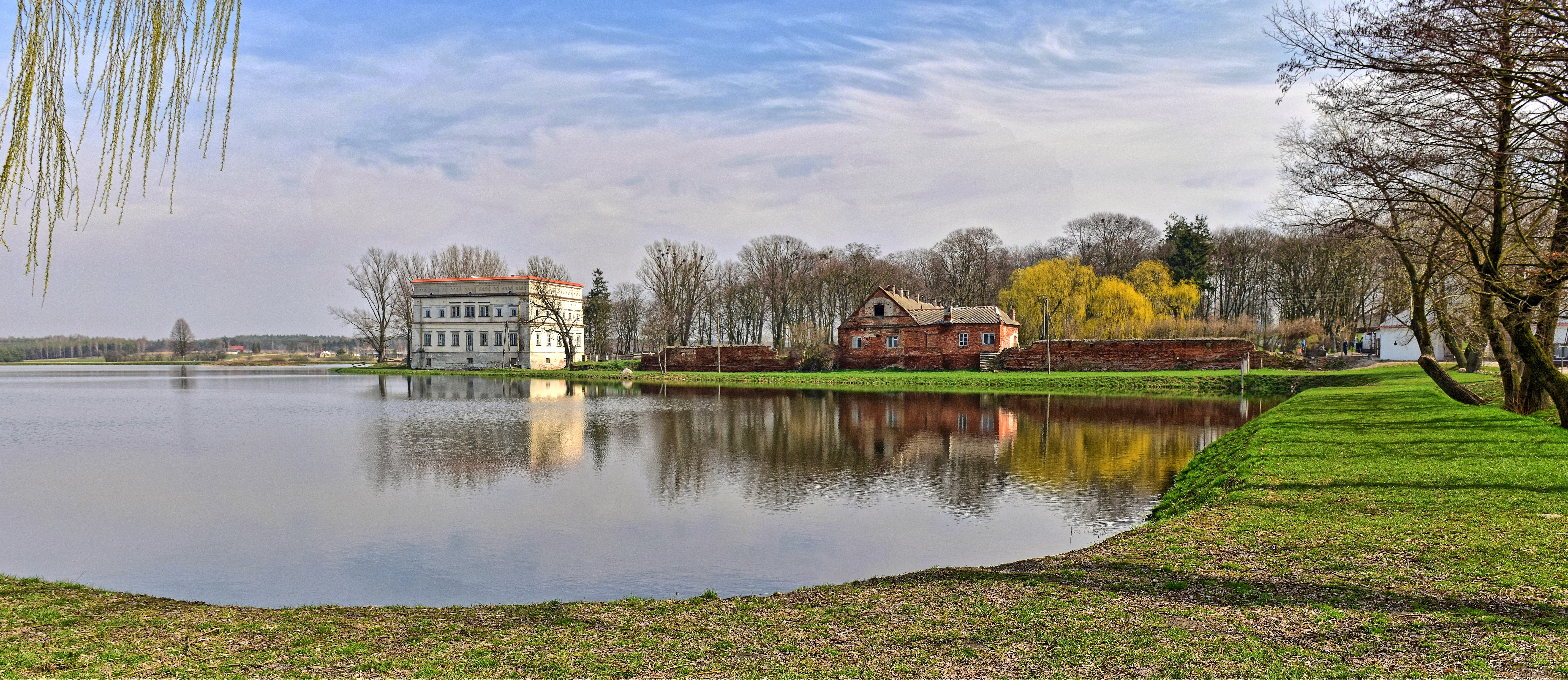 panorama zespołu pałacowego Firlejów w Czemiernikach, woj. lubelskie